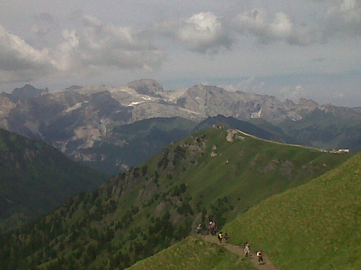 La parte nord-est del gruppo del Catinaccio vista dal Viel dal pan.